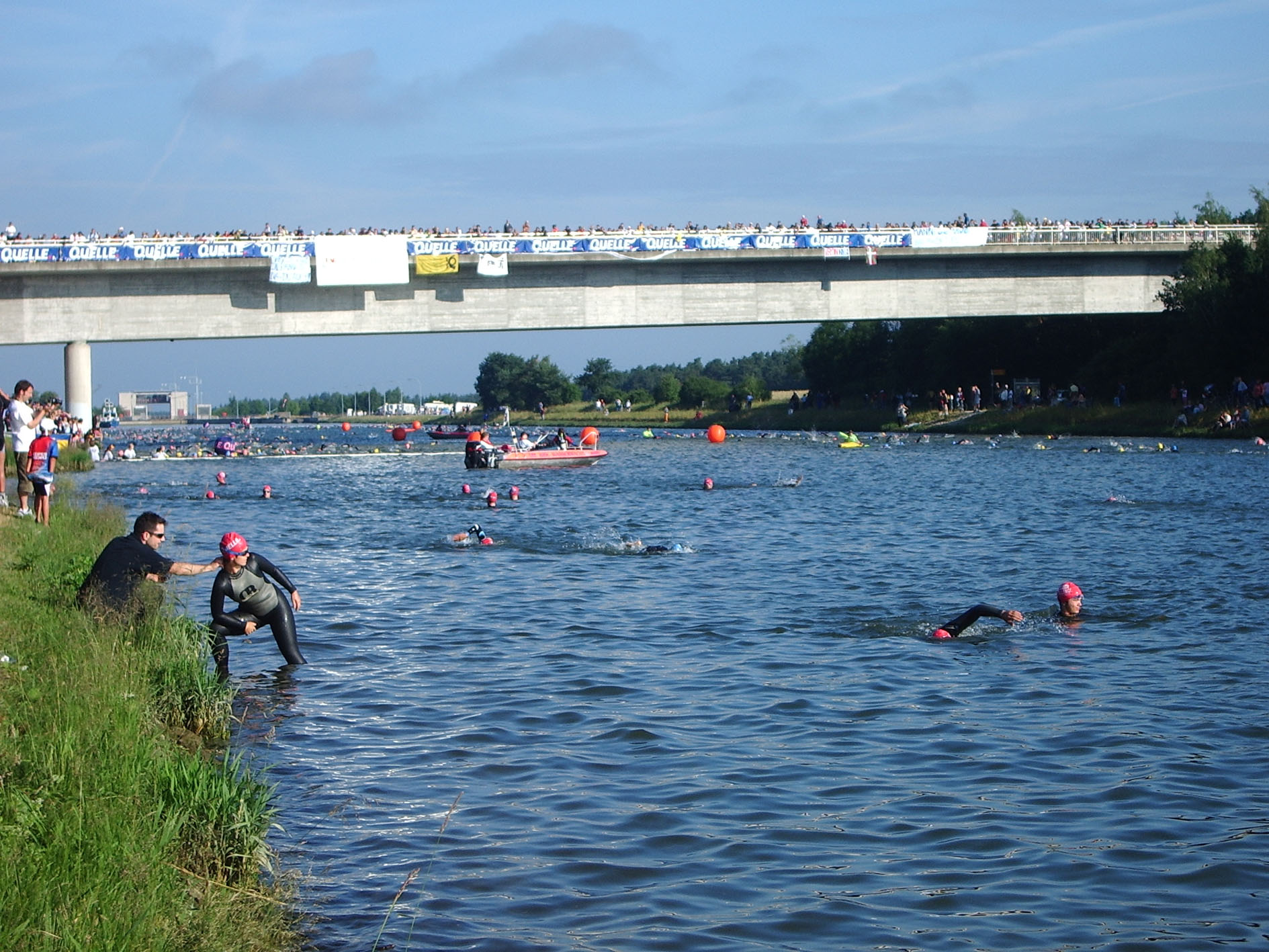 Triathlon Langdistanz 2005 in Roth (Schwimmen)